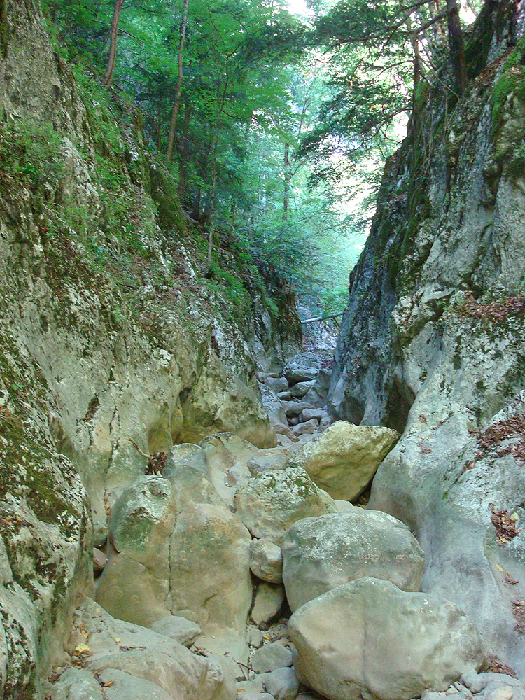 Склоны каньона в сужении